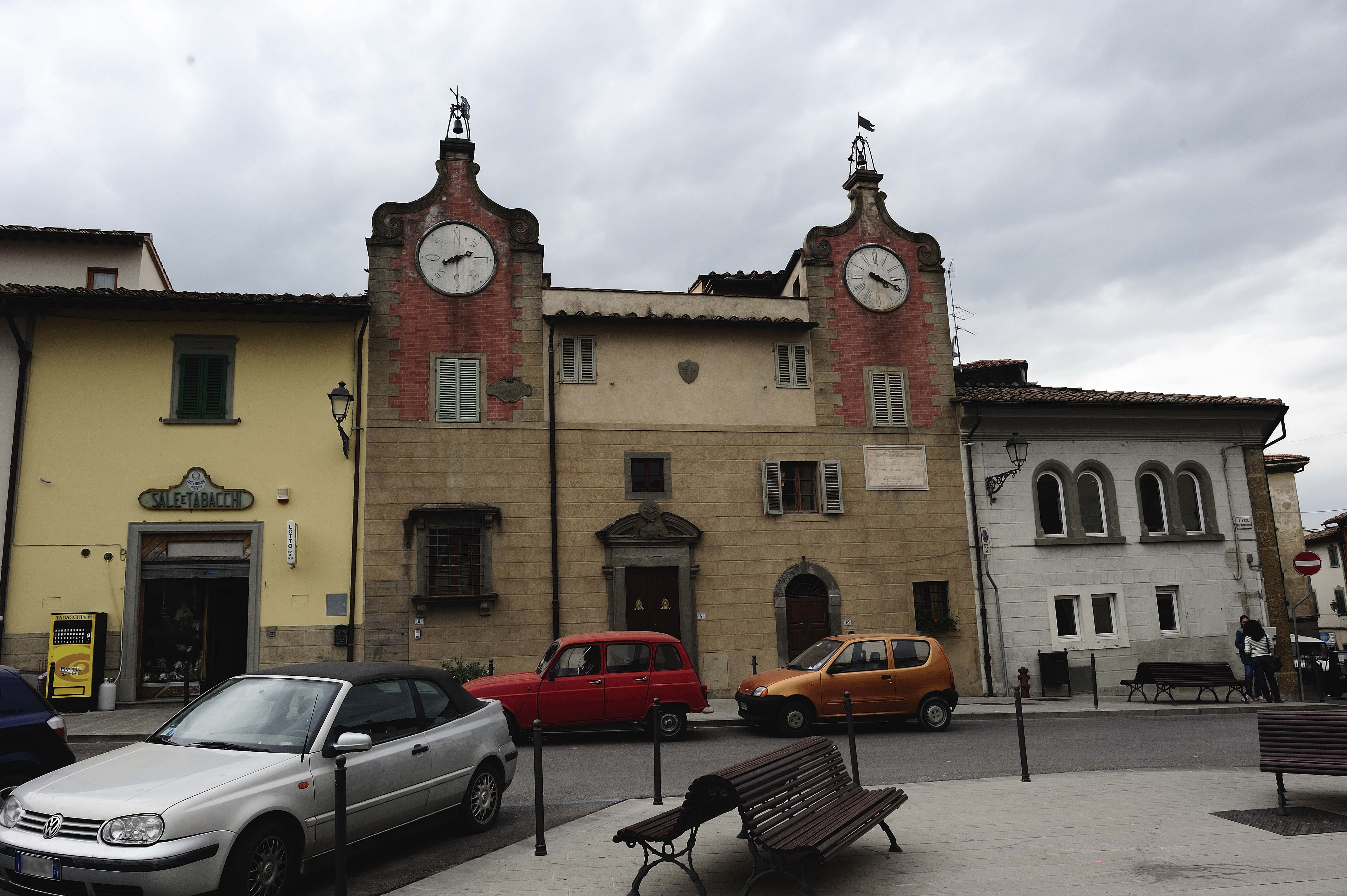 Piazza Machiavelli a Montespertoli - Firenze